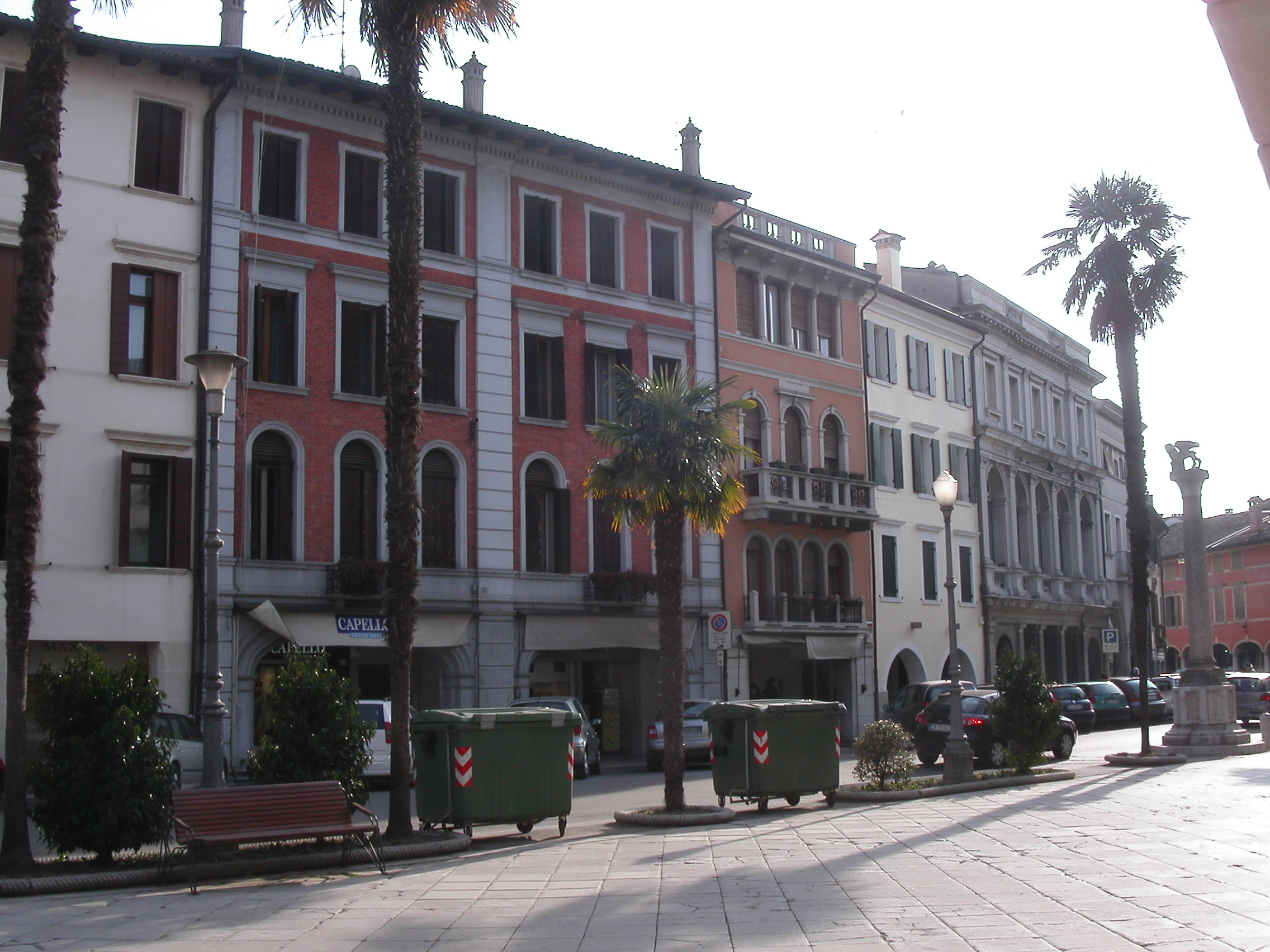 Portogruaro - Via Martiri della Liberta'